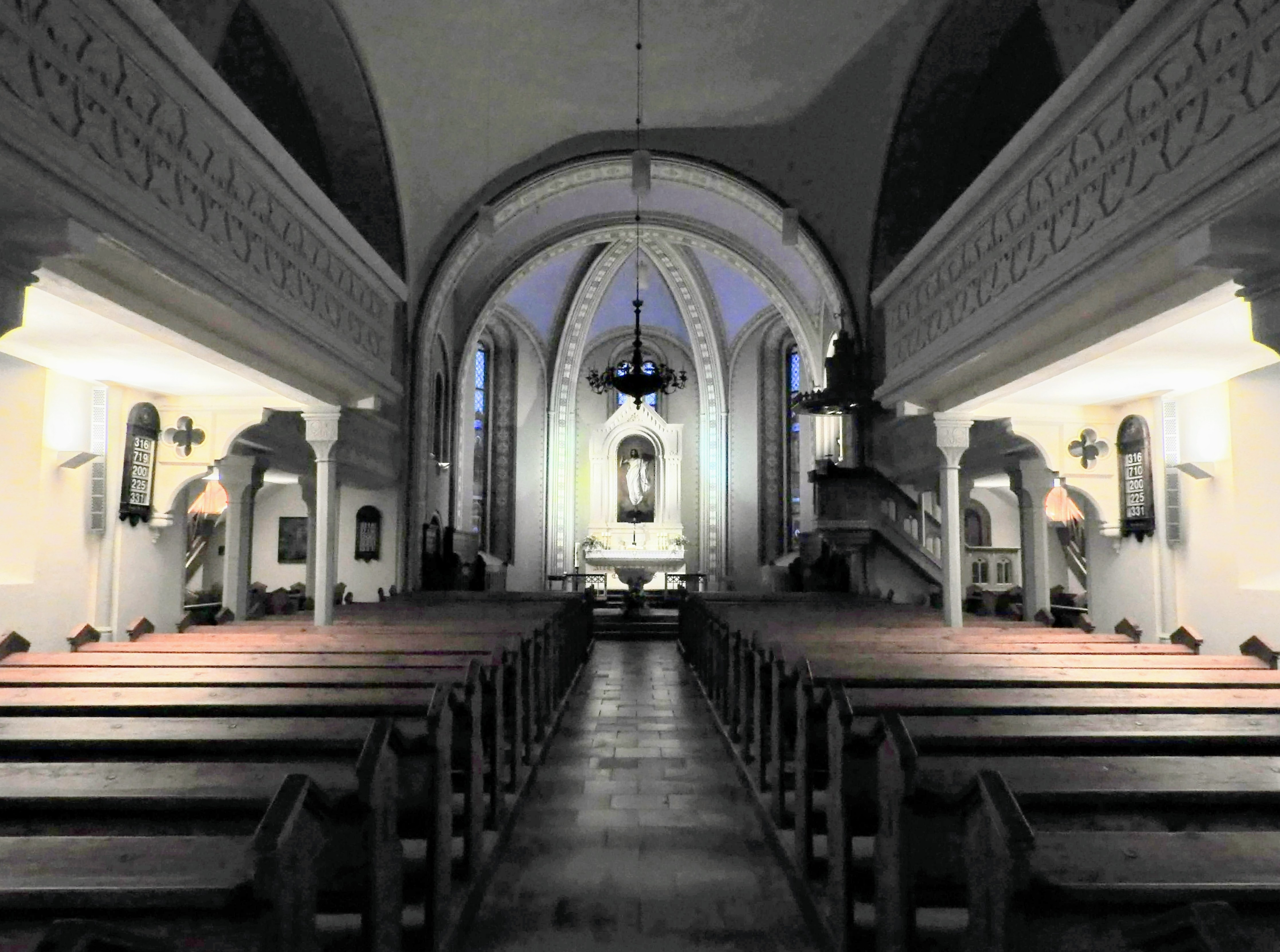 Dreieinigkeitskirche Wallern von innen